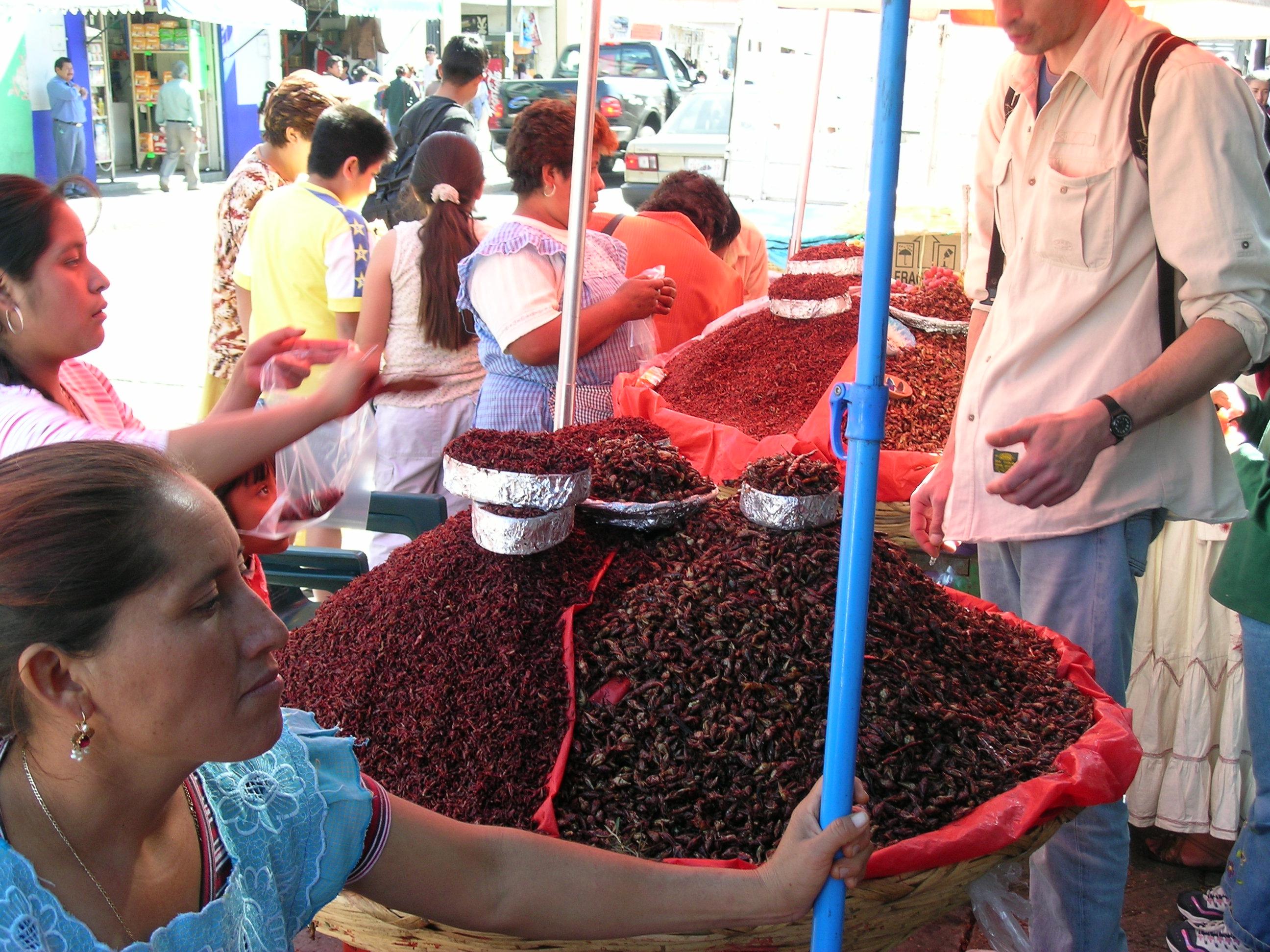 Autor:Salhedine Fecha:31 de diciembre de 2004 Lugar:Mercado de Oaxaca (México)